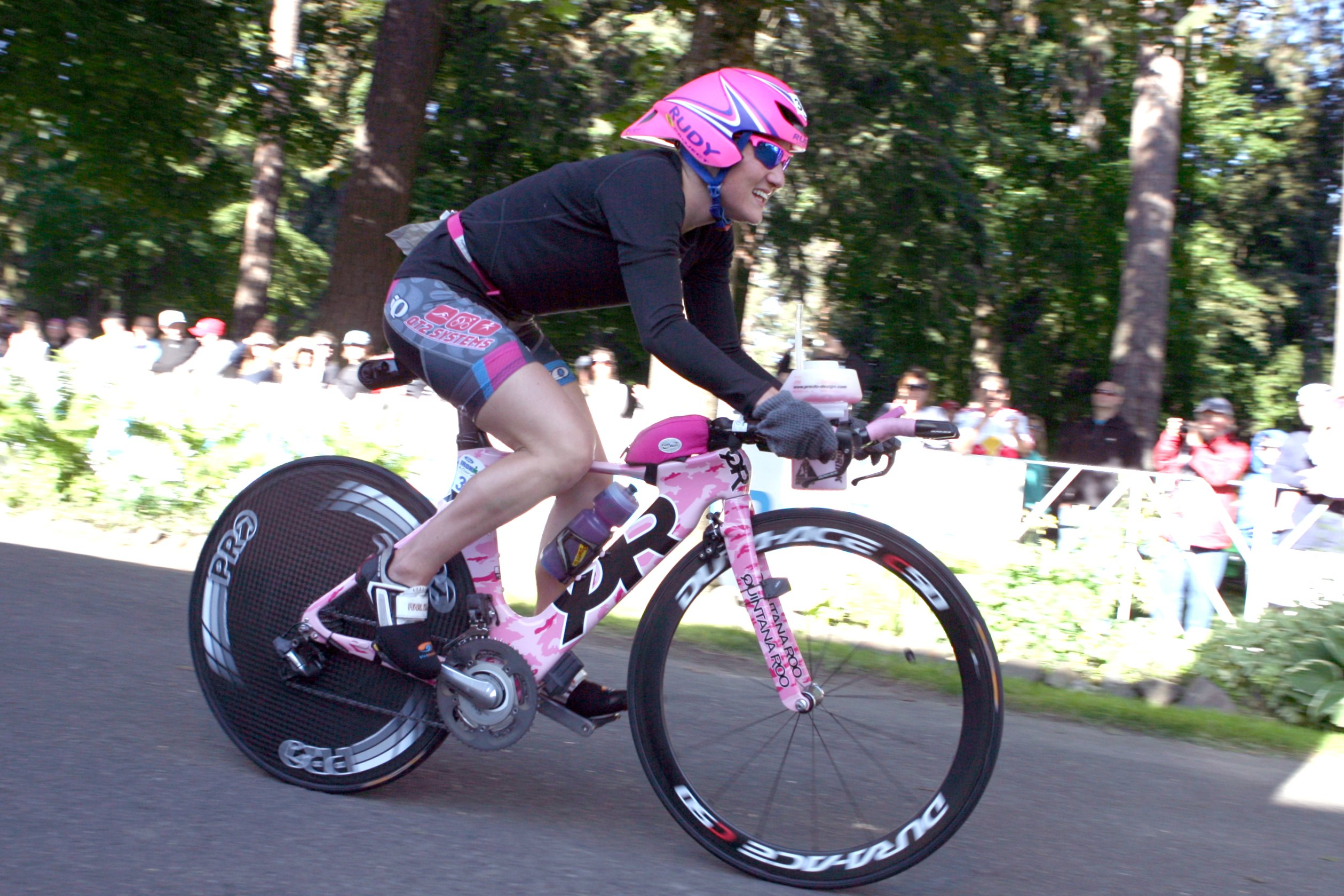 All smiles!